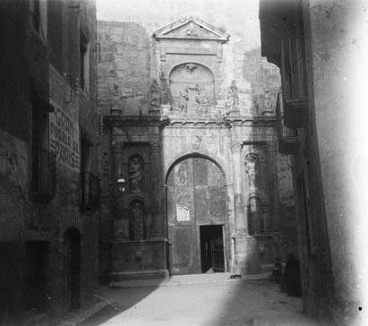 Porta de l'església de Sant Joan de Valls. Joaquim Bordons i Wehrle (1909)